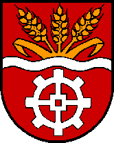 Wappen von Laakirchen, Oberösterreich „In Rot ein silberner Wellenbalken; oben aus der Teilungslinie wachsend drei goldene, fächerförmig angeordnete Ähren mit zwei Blättern, unten ein silbernes Mühlrad.“